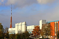 Entreprise d'industrie laitière lettonne "Rigas piena kombinats" située dans le voisinage de Katlakalns, rue Bauskas-180 à Riga (Lettonie).